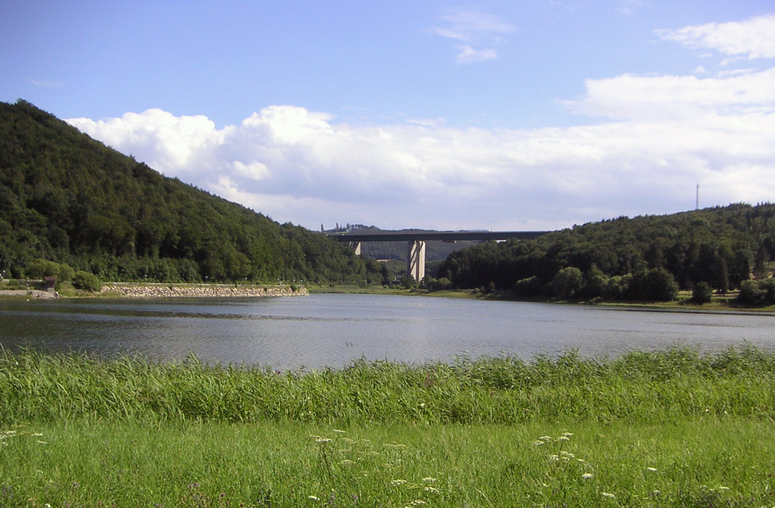 Wientalwasserwerk am Wienerwaldsee das die Wientalwasserleitung speist, deutlich zu sehen ist die Staumauer im Norden des Sees, selbst aufgenommen am 24.07.2005